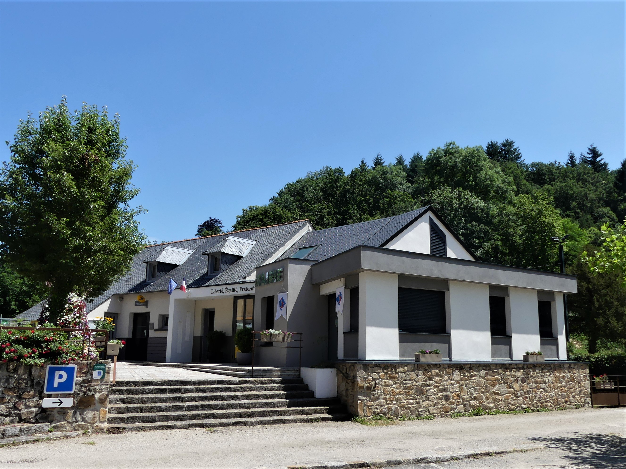 La mairie de Salmiech, Aveyron, France.